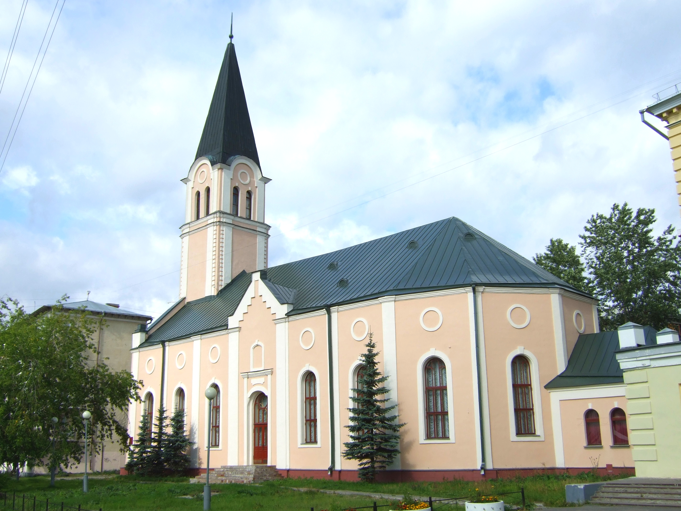 Архангельская кирха (до революции 1917 года Лютеранская кирха Святой Екатерины)